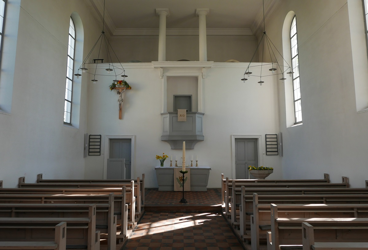 Innenraum der Karolinenkirche in der Osterzeit 2019 mit Osterkerze, geschmücktem Kreuz und geschmücktem Taufstein